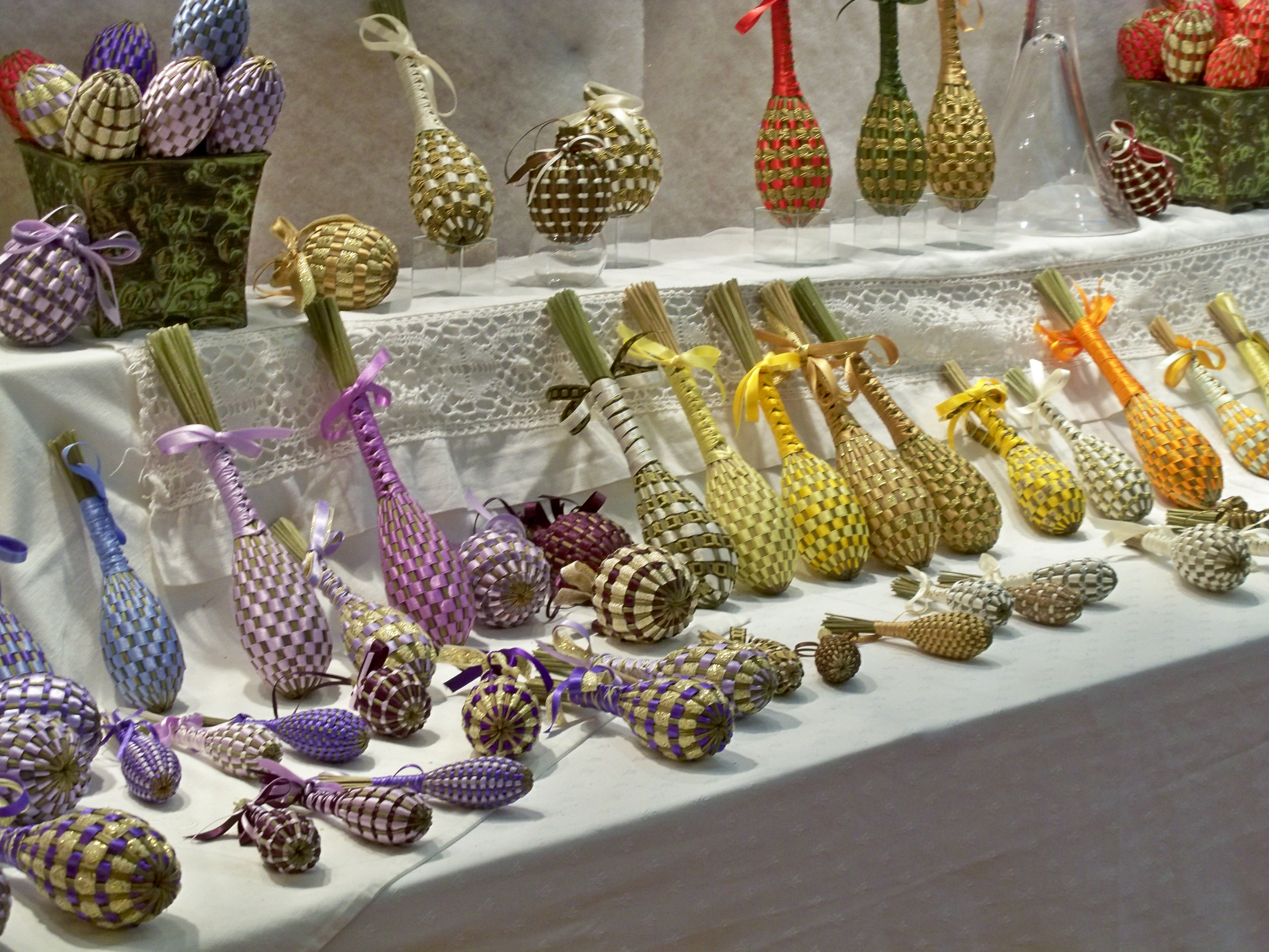 Stand de Navettes de lavandes sur le marché de Noël d'Avignon, Vaucluse, France